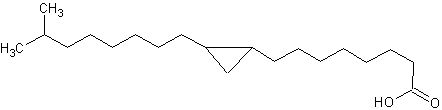 Химическая формула жирной карболовой кислоты